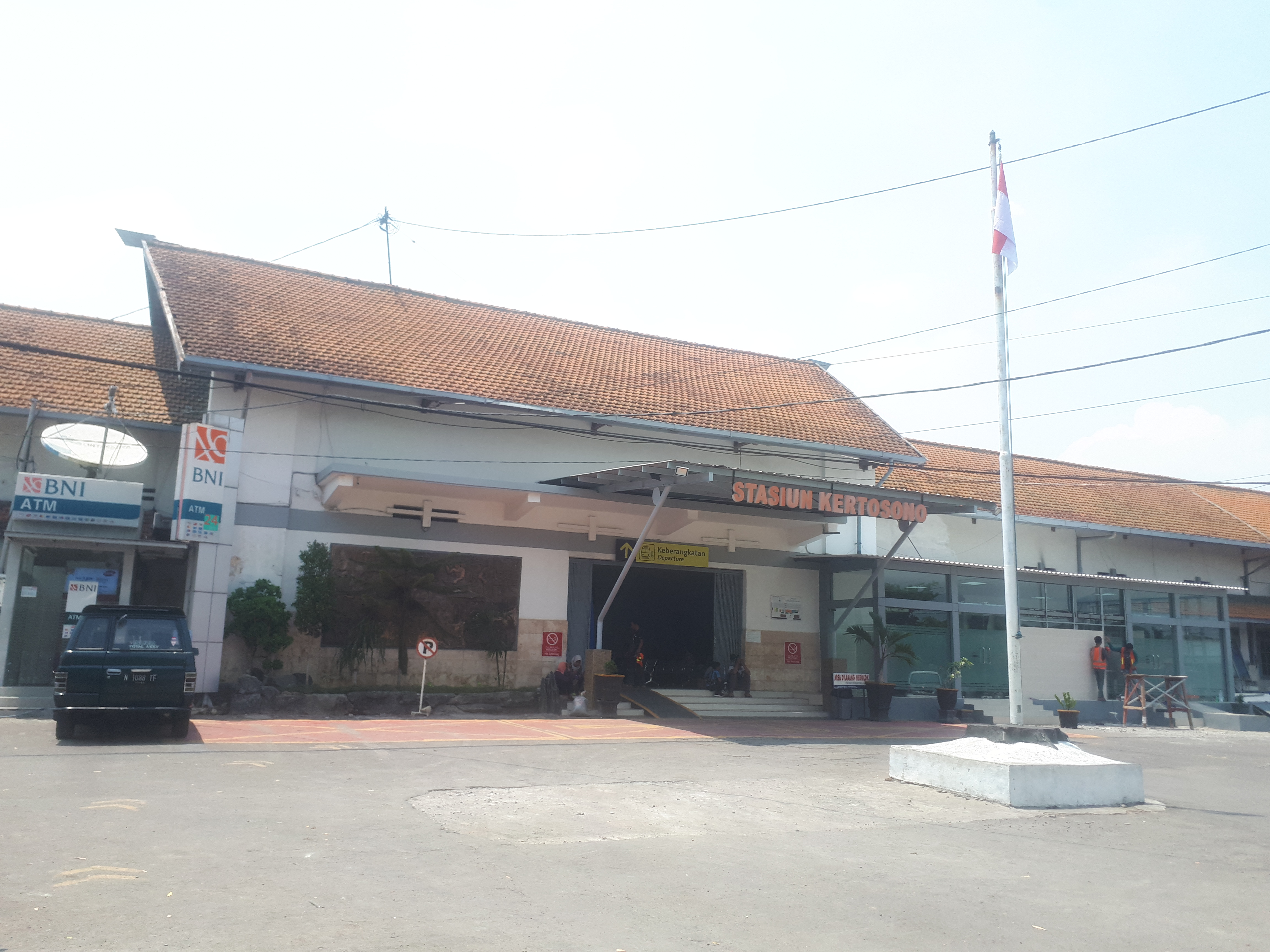 Halaman depan Stasiun Kertosono tahun 2019